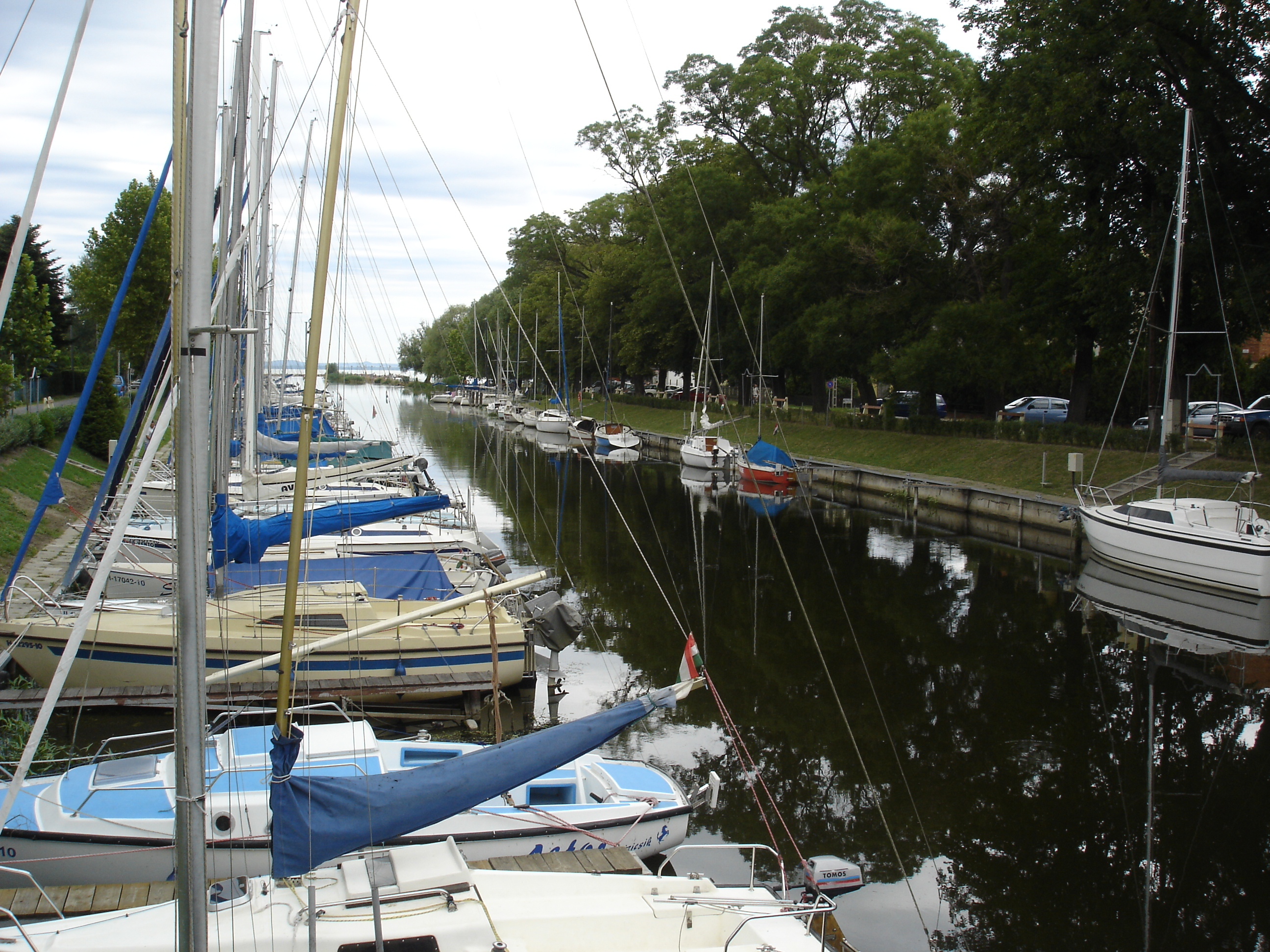 Balatonmáriafürdő kikötője